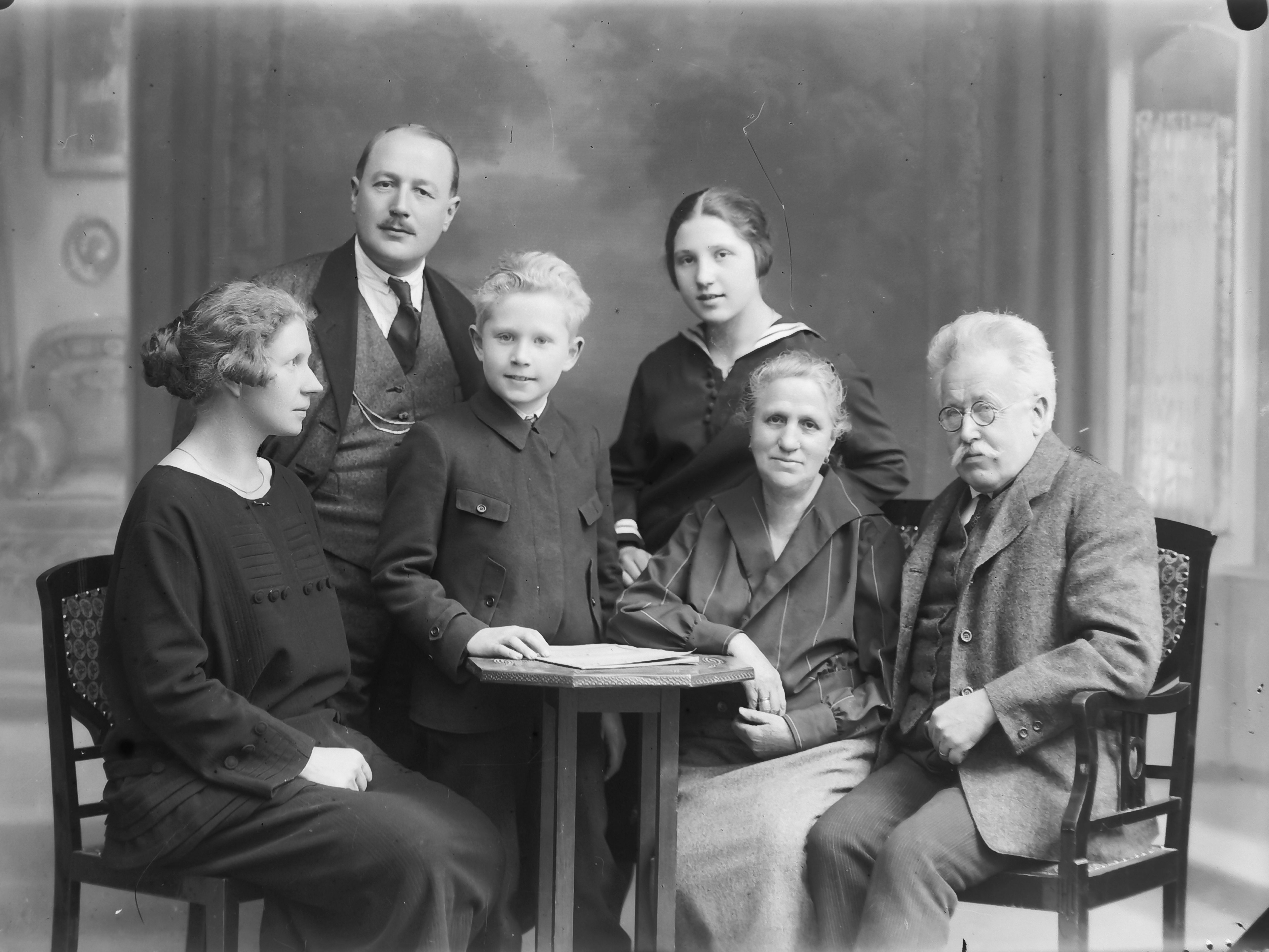 Nikolaus Kuss II mit Frau Katharina mit seinem Sohn Josef und Maria Anna sowie Tochter Marianne und Sohn Josef.